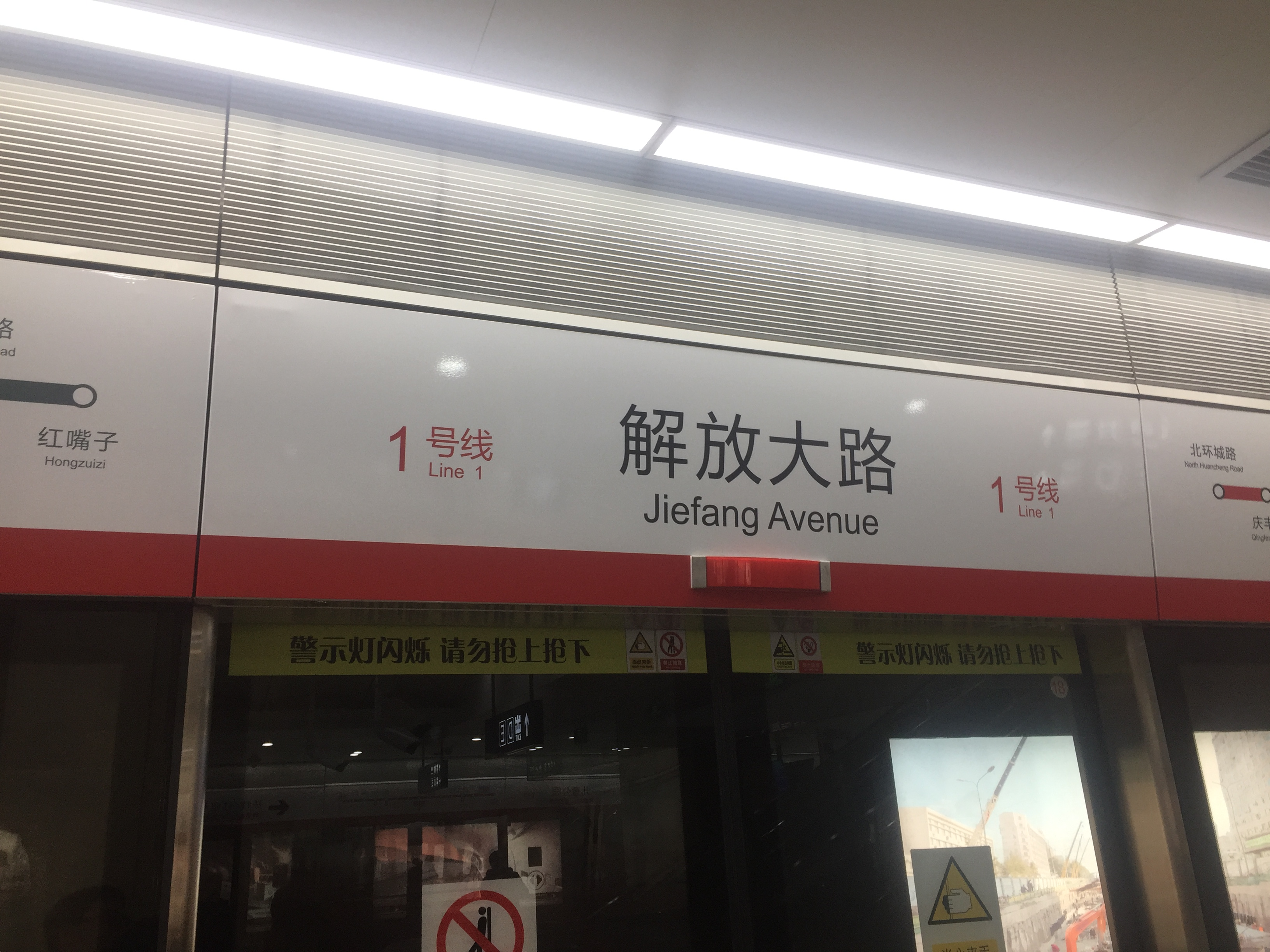 长春轨道交通一号线解放大路站新贴图